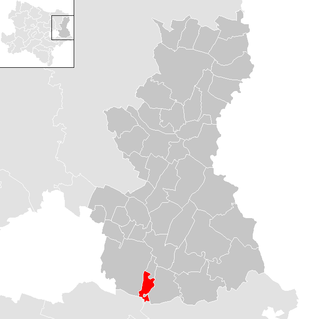 Bezirk Gänserndorf